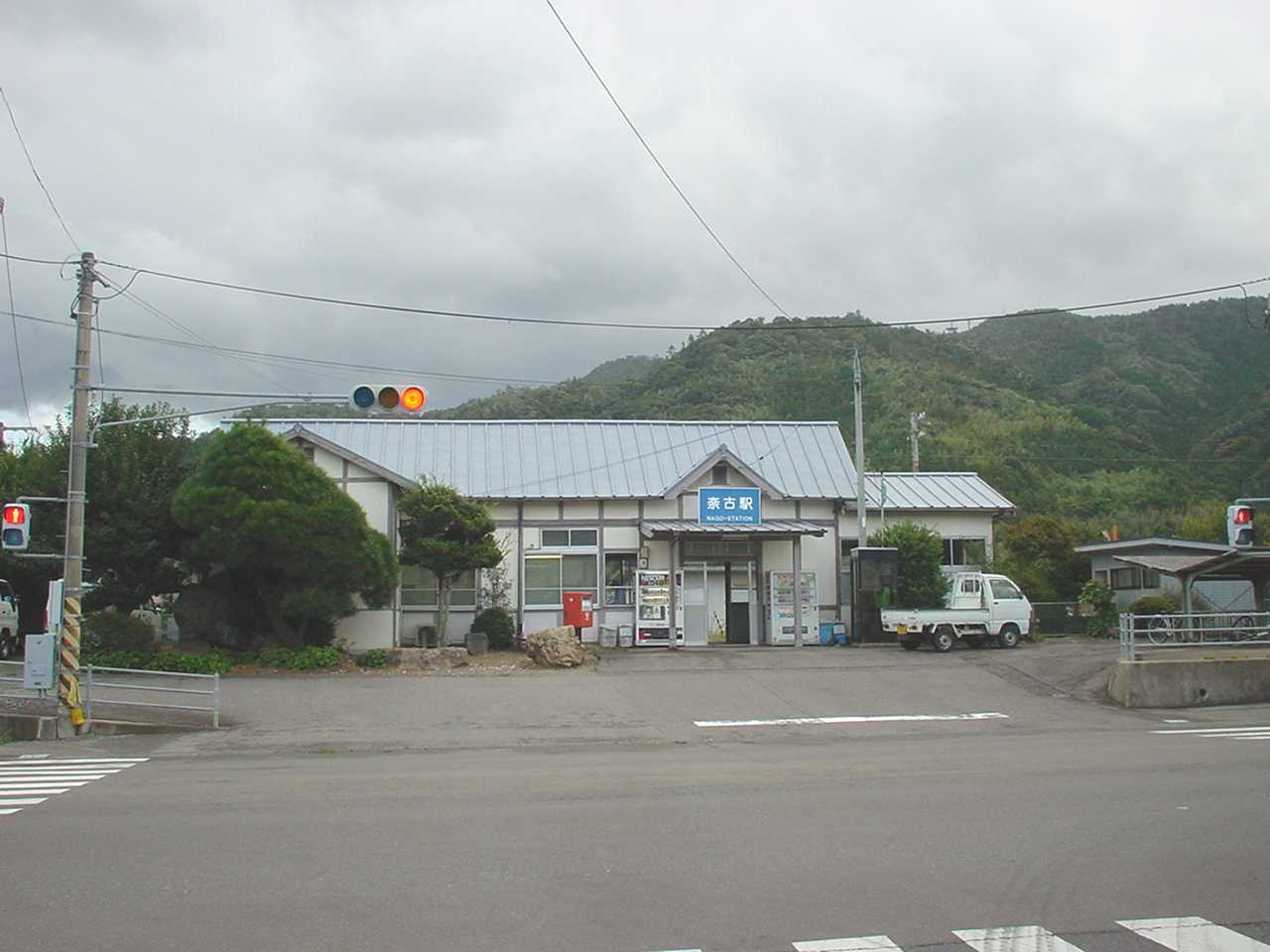 奈古駅（2005年10月22日投稿者が撮影）